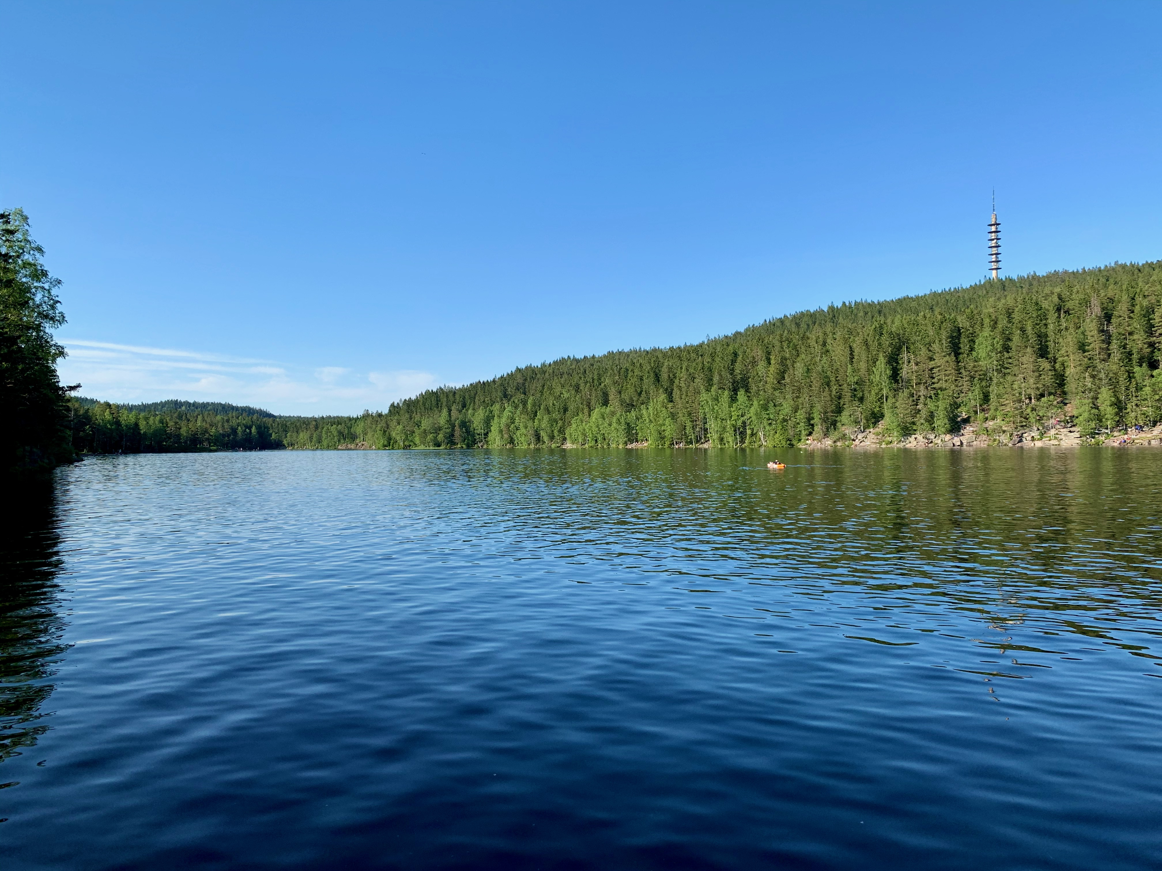 Steinbruvannet i Lillomarka i Oslo